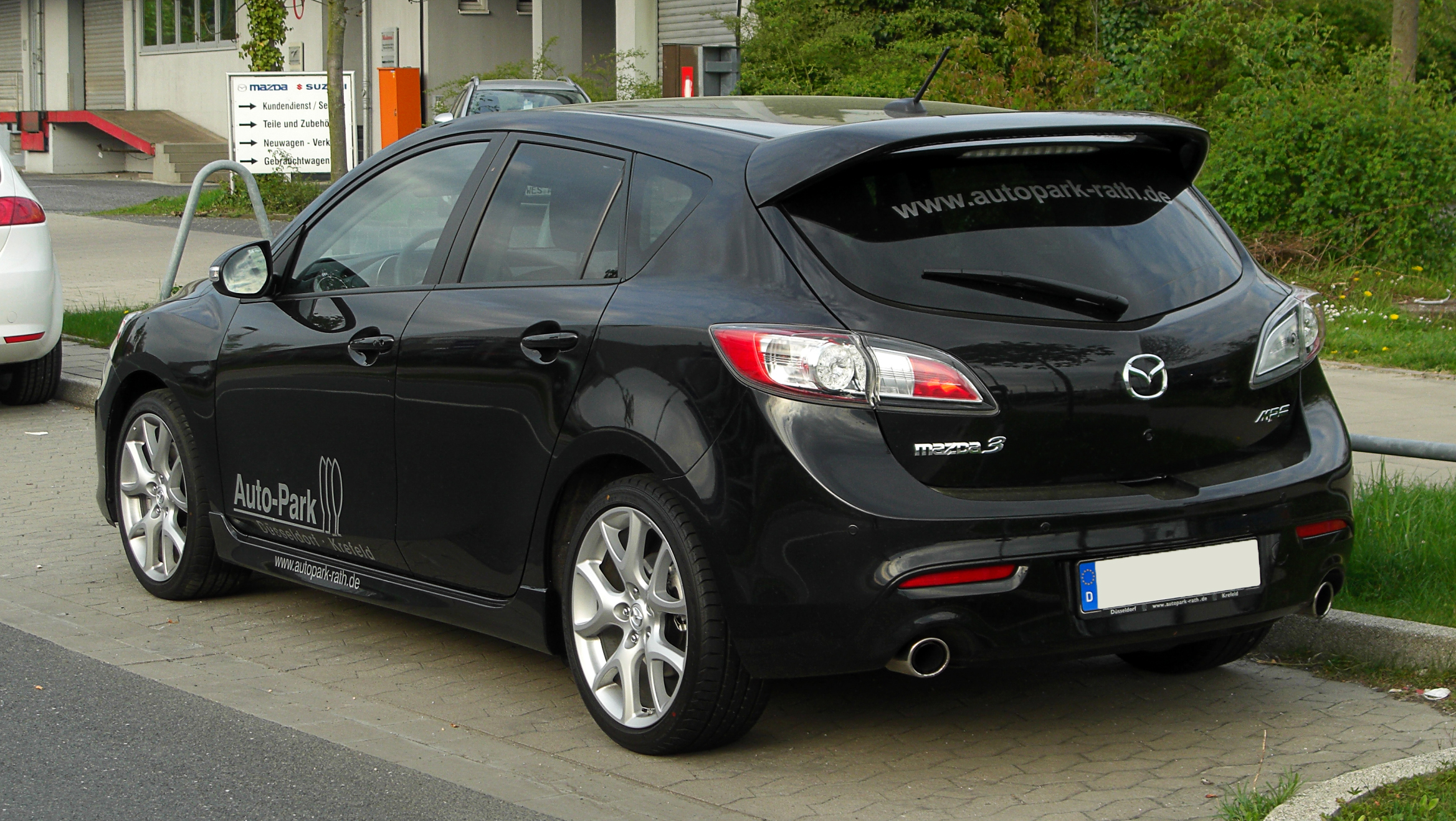 Mazda3 MPS (BL)